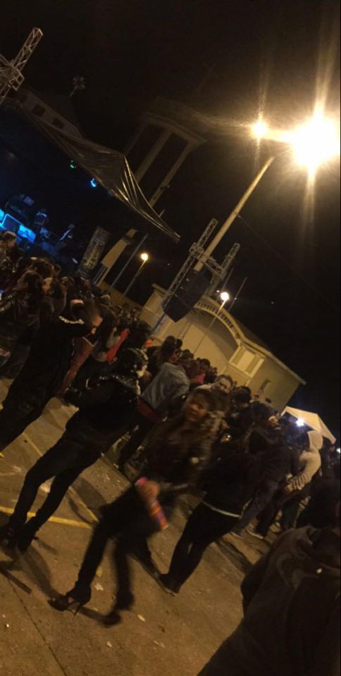 En Checa se festejan tres noches seguidas el tradicional Carnaval con show artísticos y baile popular.